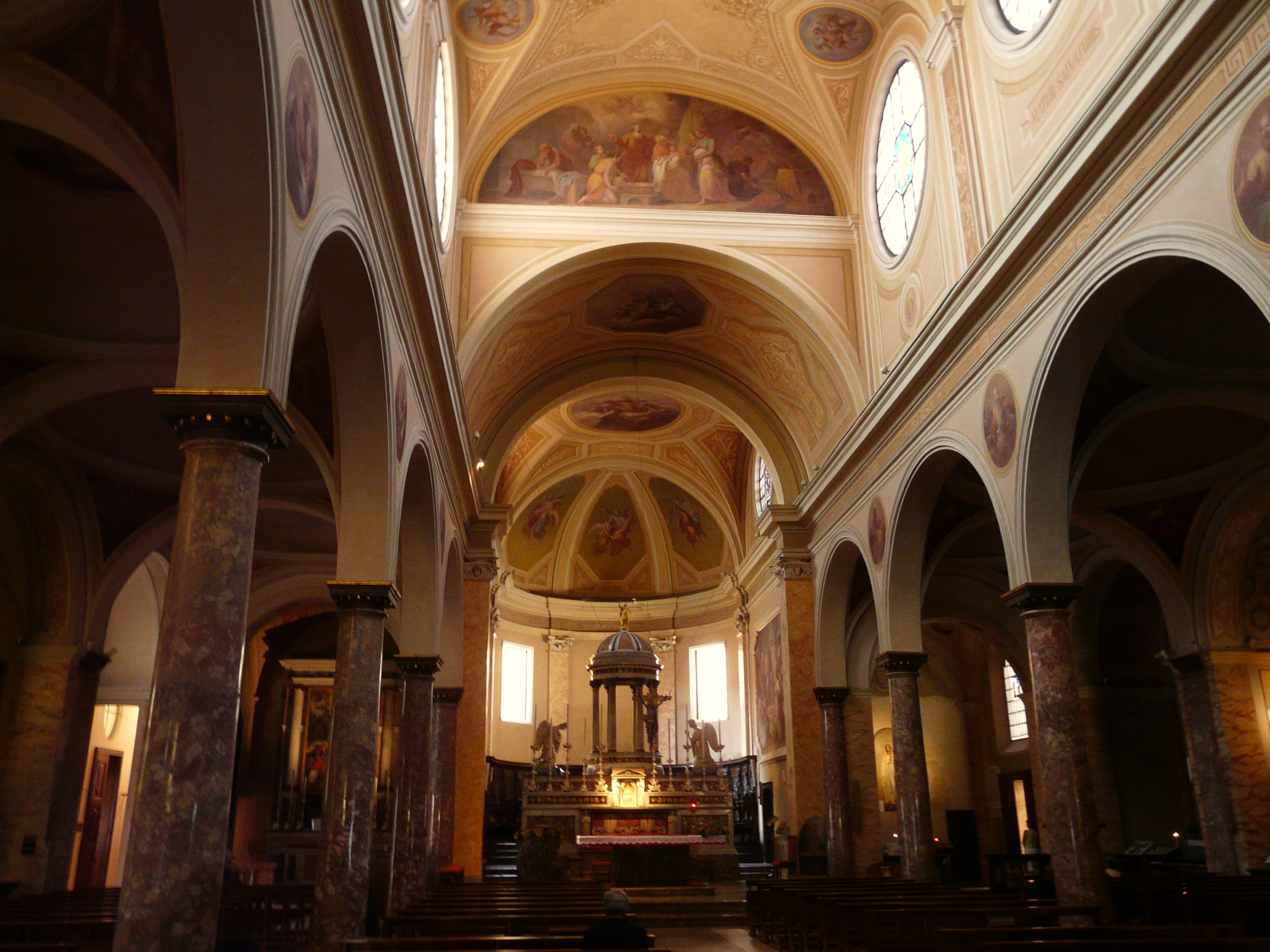 Basilica di Santa Maria Nuova, Abbiategrasso, Lombardia, Italia